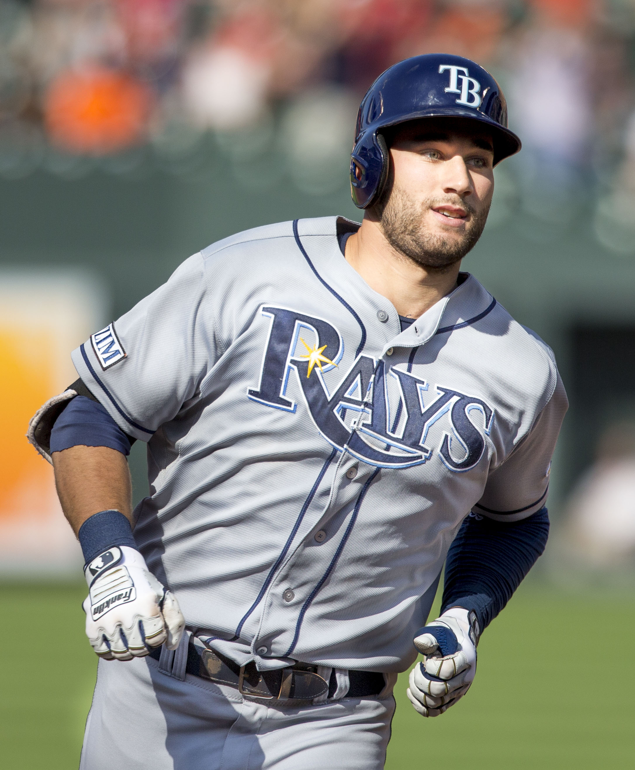 Kevin Kiermaier